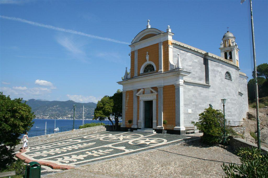 Chiesa di San Giorgio, Portofino, Liguria, Italia